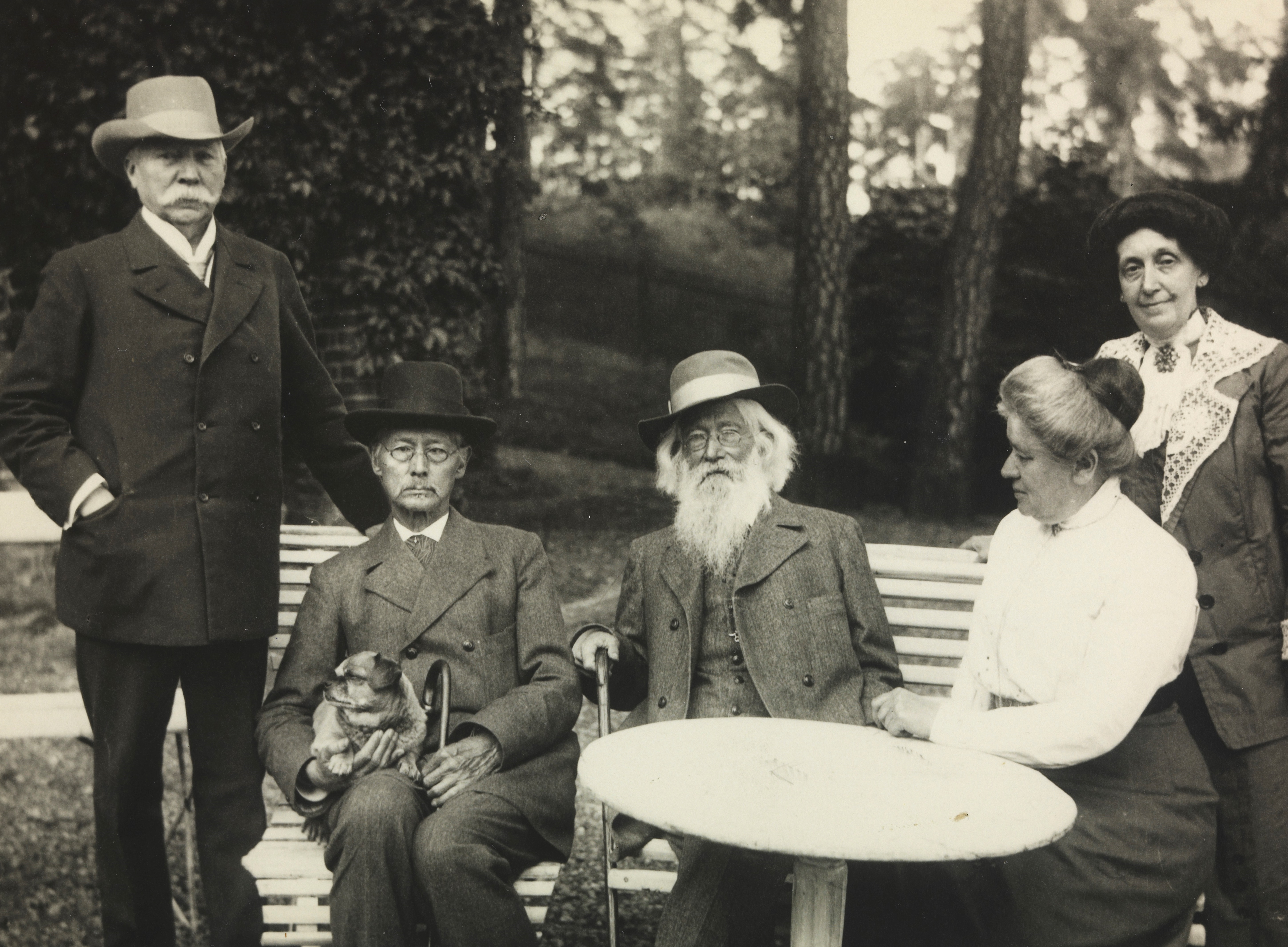 Fra venstre Thorvald Lammers, Georg Ossian Sars, zoolog, Johan Ernst Sars, historiker, Mally Lammers, sangerinne og Maja Michelsen, i en park (utenfor Polhøgda ). Depicted person: Lammers, Thorvald (1841-1922) Depicted person: Sars, Georg Ossian (1837-1927) Depicted person: Sars, Johan Ernst Welhaven (1835-1917) Depicted person: Lammers, Mally (1850-1929); født Sars Depicted place: Akershus, Bærum